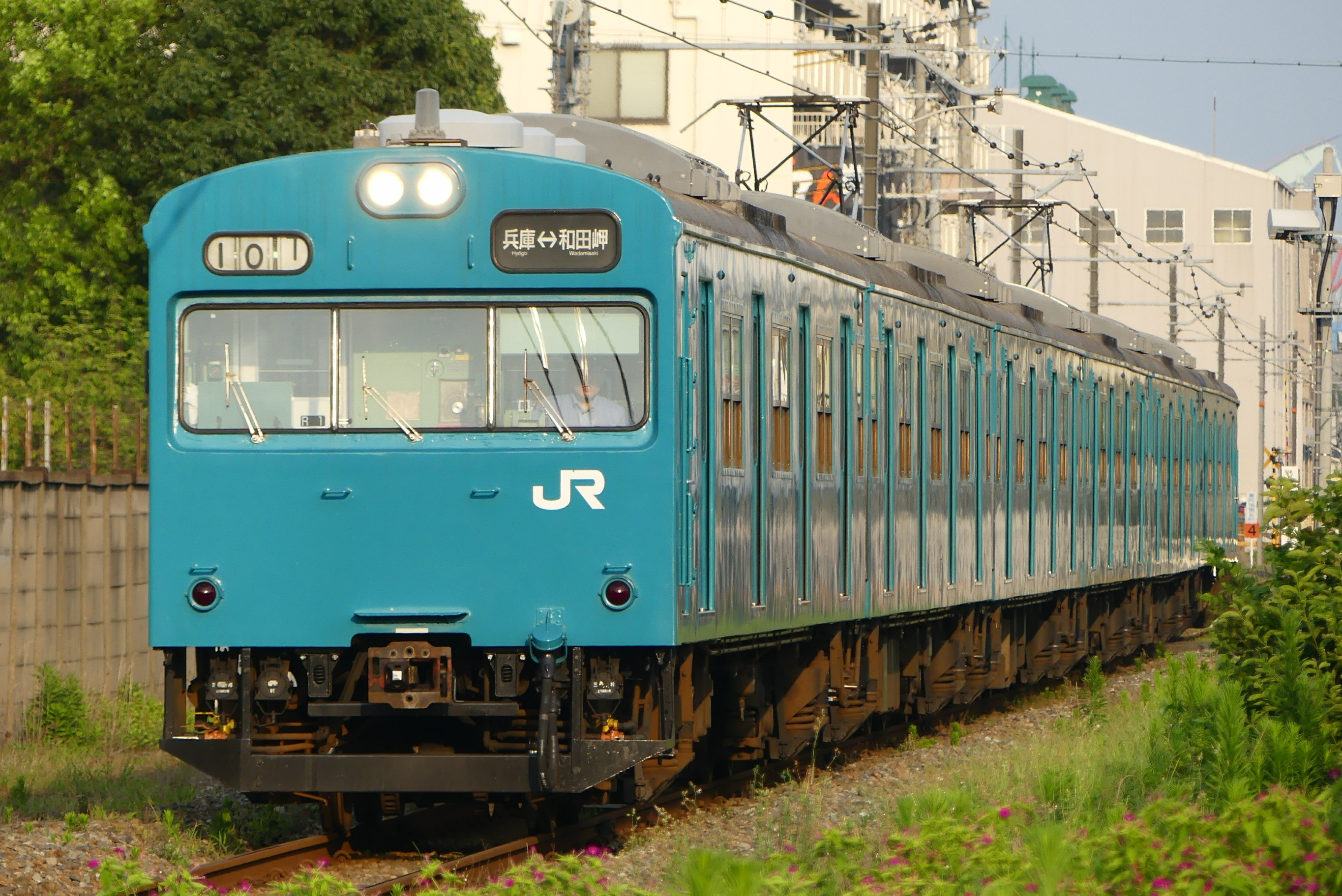 和田岬線用の103系R1編成